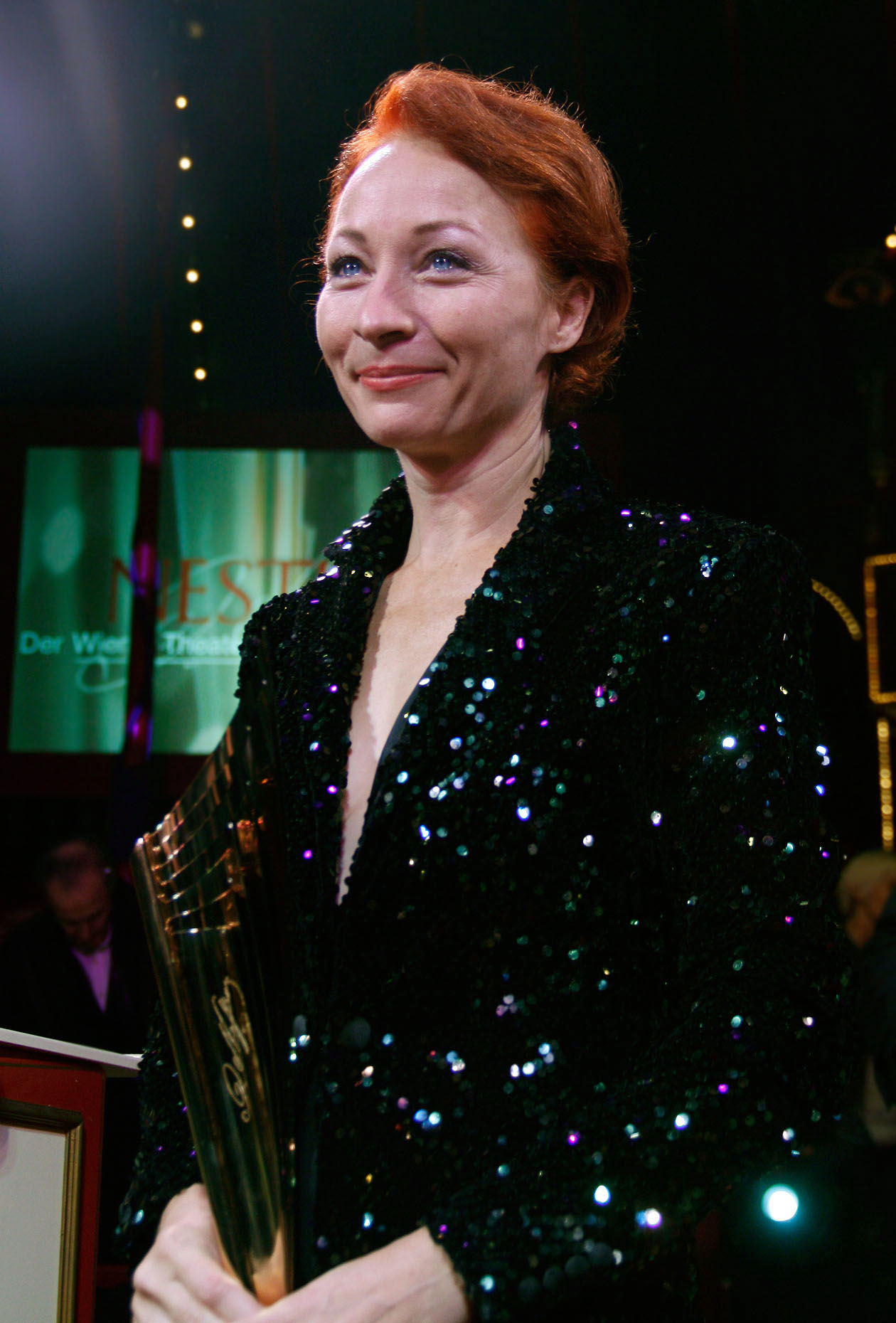 Sona MacDonald ausgezeichnet für die Beste Nebenrolle während der Verleihung des Nestroy-Theaterpreises 2009 (Circus Roncalli auf dem Wiener Rathausplatz).